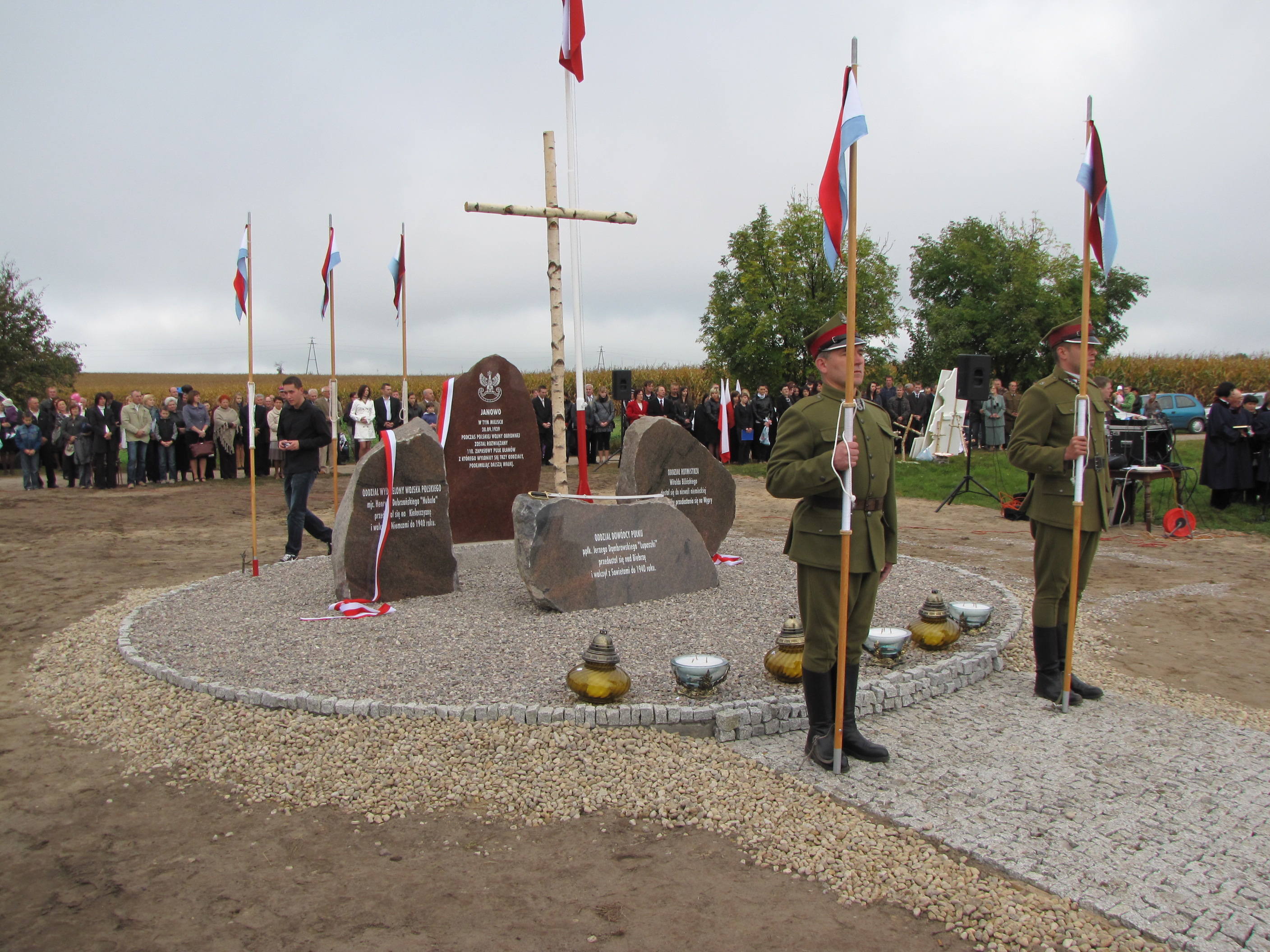 zdjęcie wykonano w dniu odsłonięcia pomnika, 2.10.2011r.